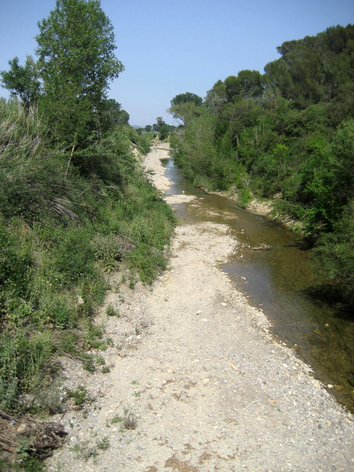 La Berre, seen from route D6009, near Réserve Africaine de Sigean, département de l'Aude, France